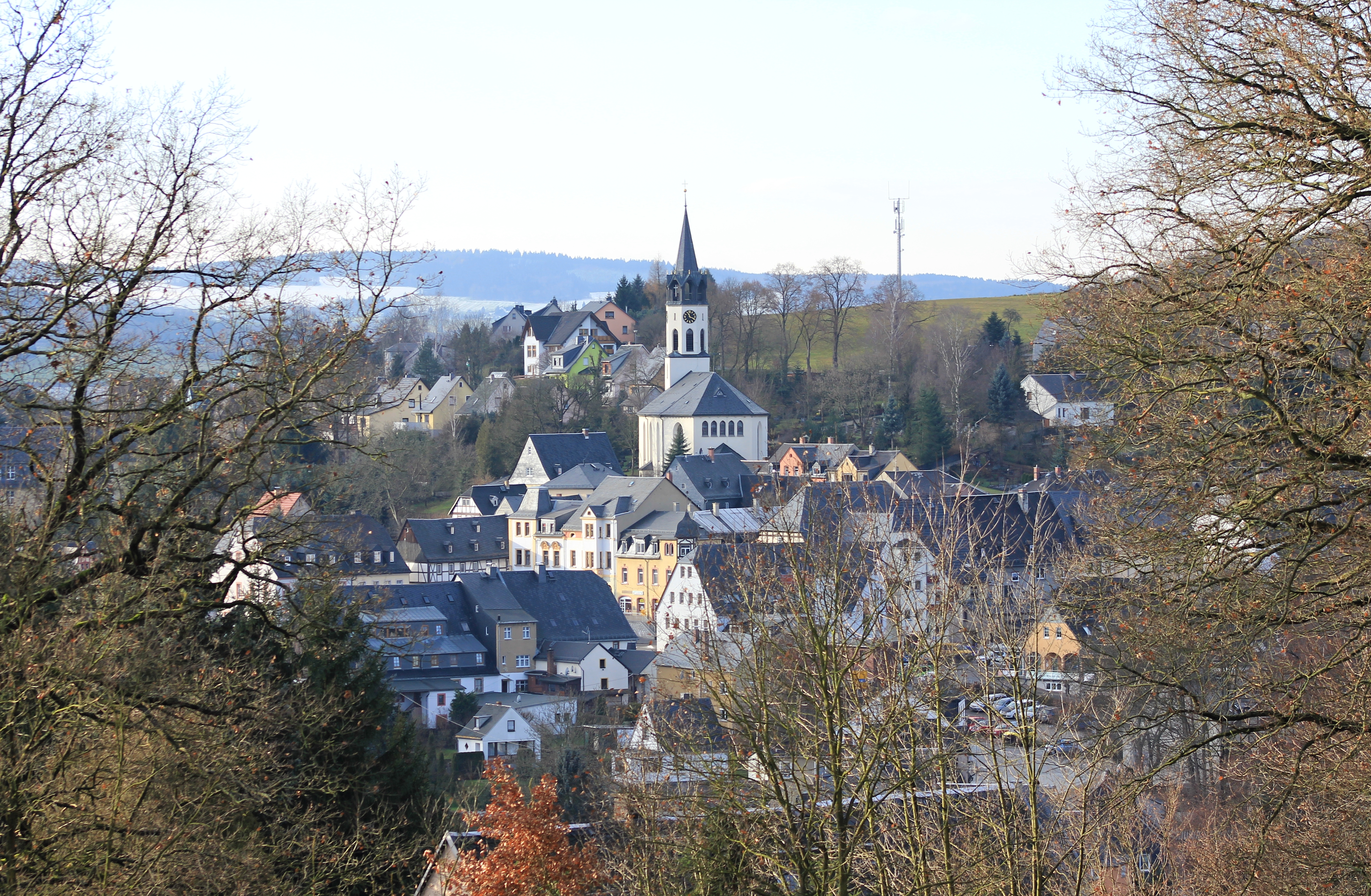 Altstadt Hartenstein. Erzgebirgskreis. Sachsen.